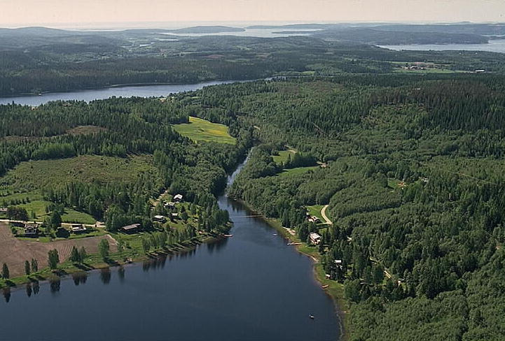 Miljö med en vattensåg . Motiv: Sörbrynge Nyckelord: Flygbilder, Riksintressen Kategori: SkogslandskapMiljö med en vattensåg.